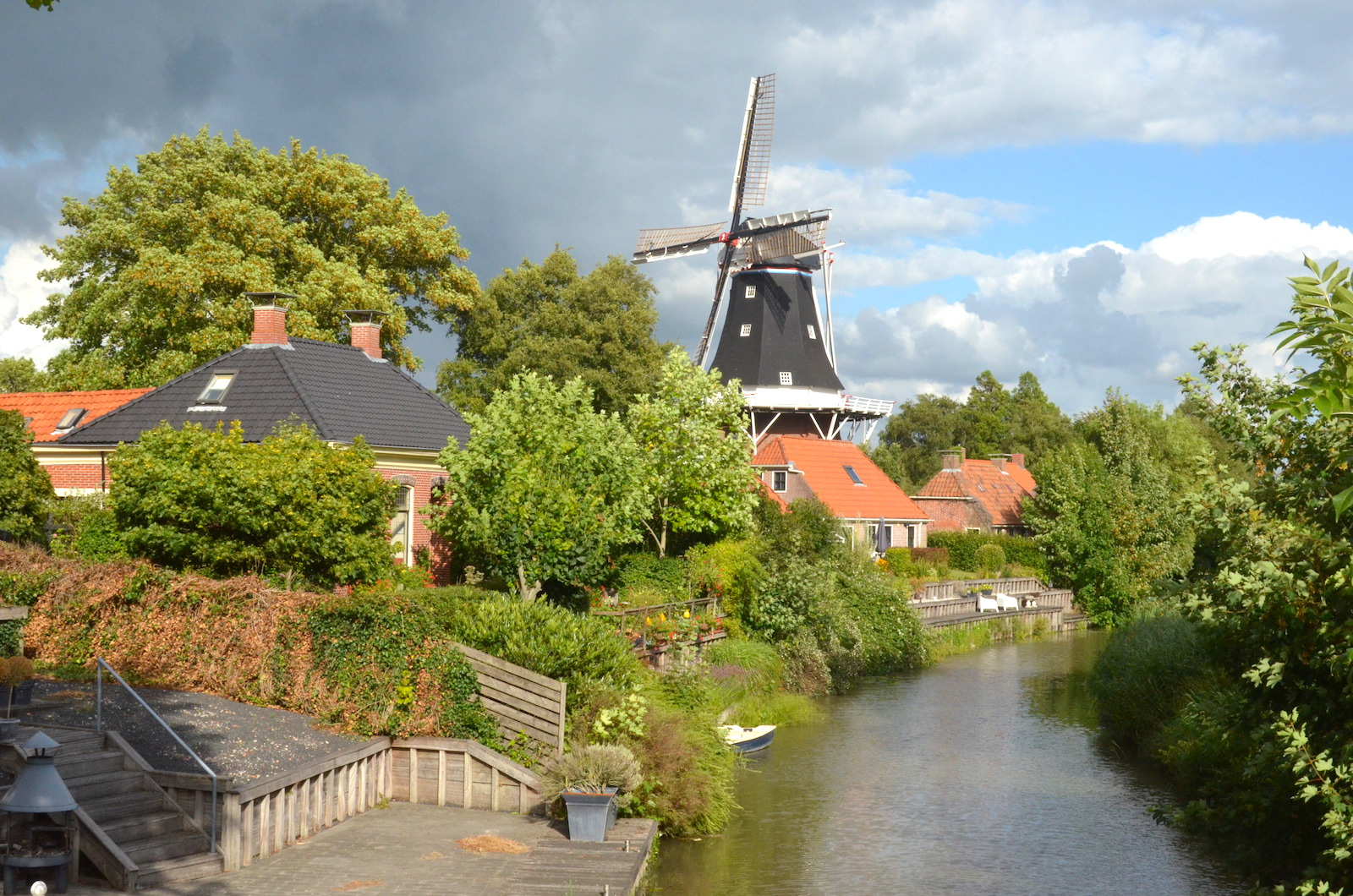 Molen Hollands Welvaart te Mensingeweer. Foto: Erik Swierstra.